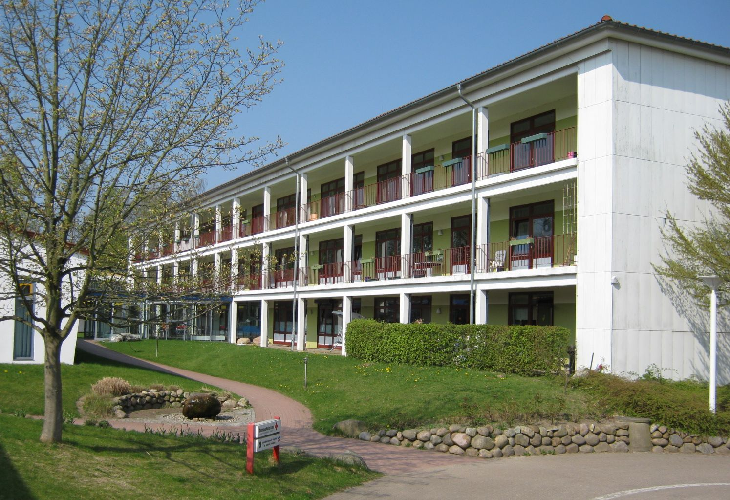 Fotografie des Internats vom DRK-Schul- und Therapiezentrum Raisdorf